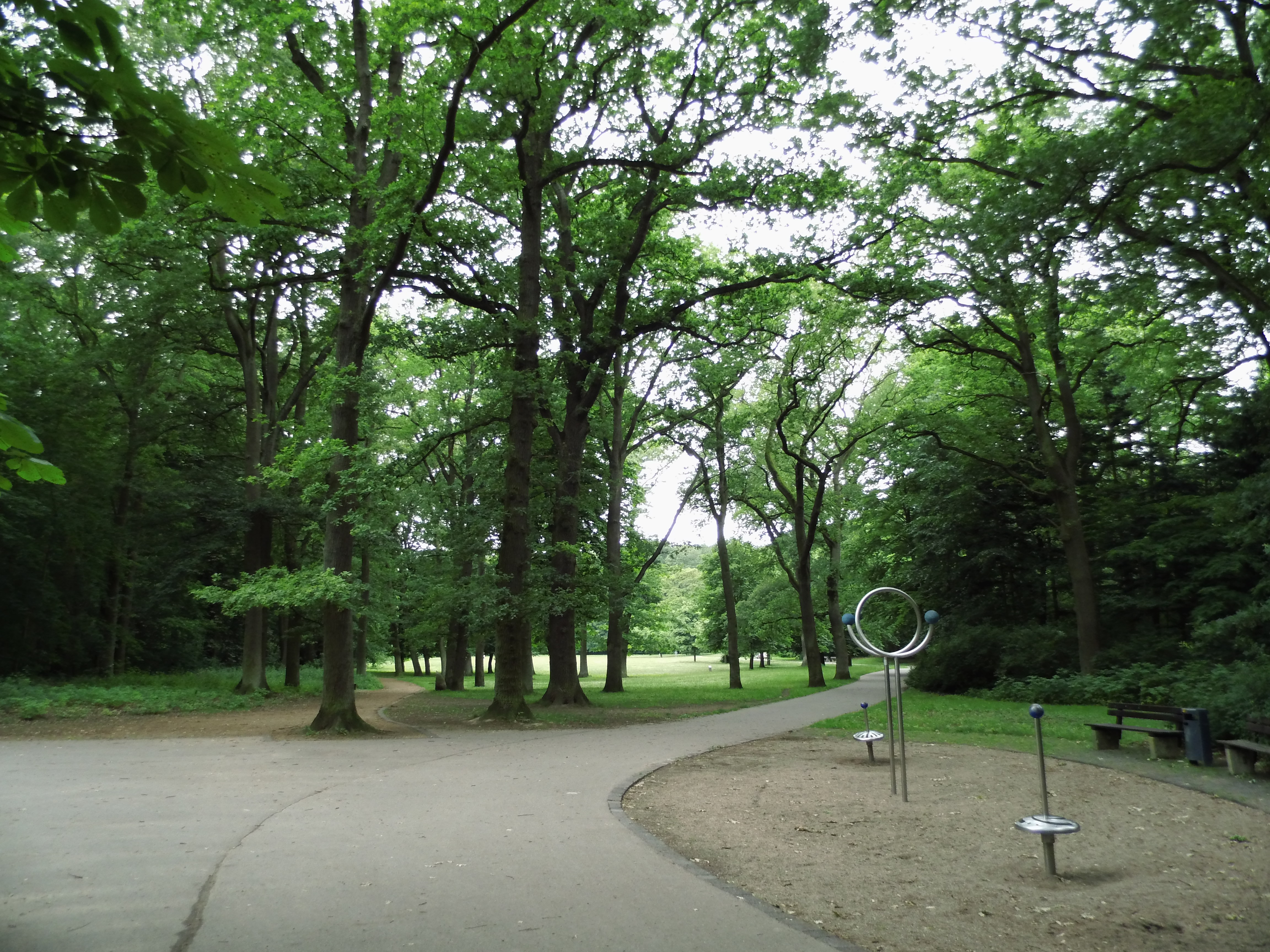 Im Rostocker Barnstofer Wald fotografiert, in Richtung des Kastanienplatzes